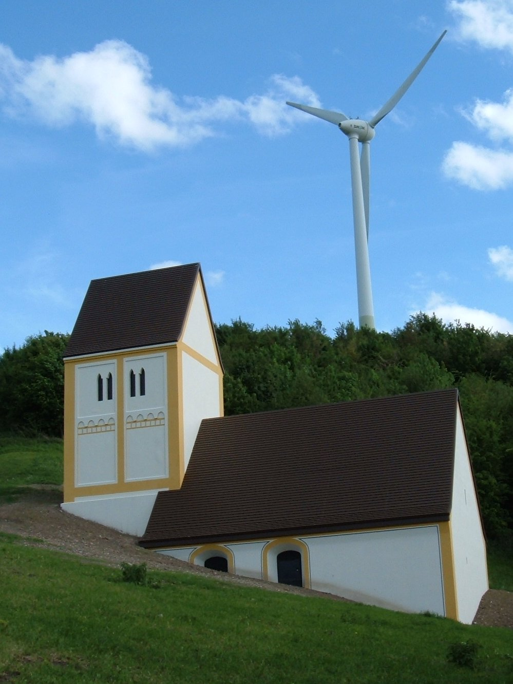 Monument "Versunkenes Dorf", Munich, Germany